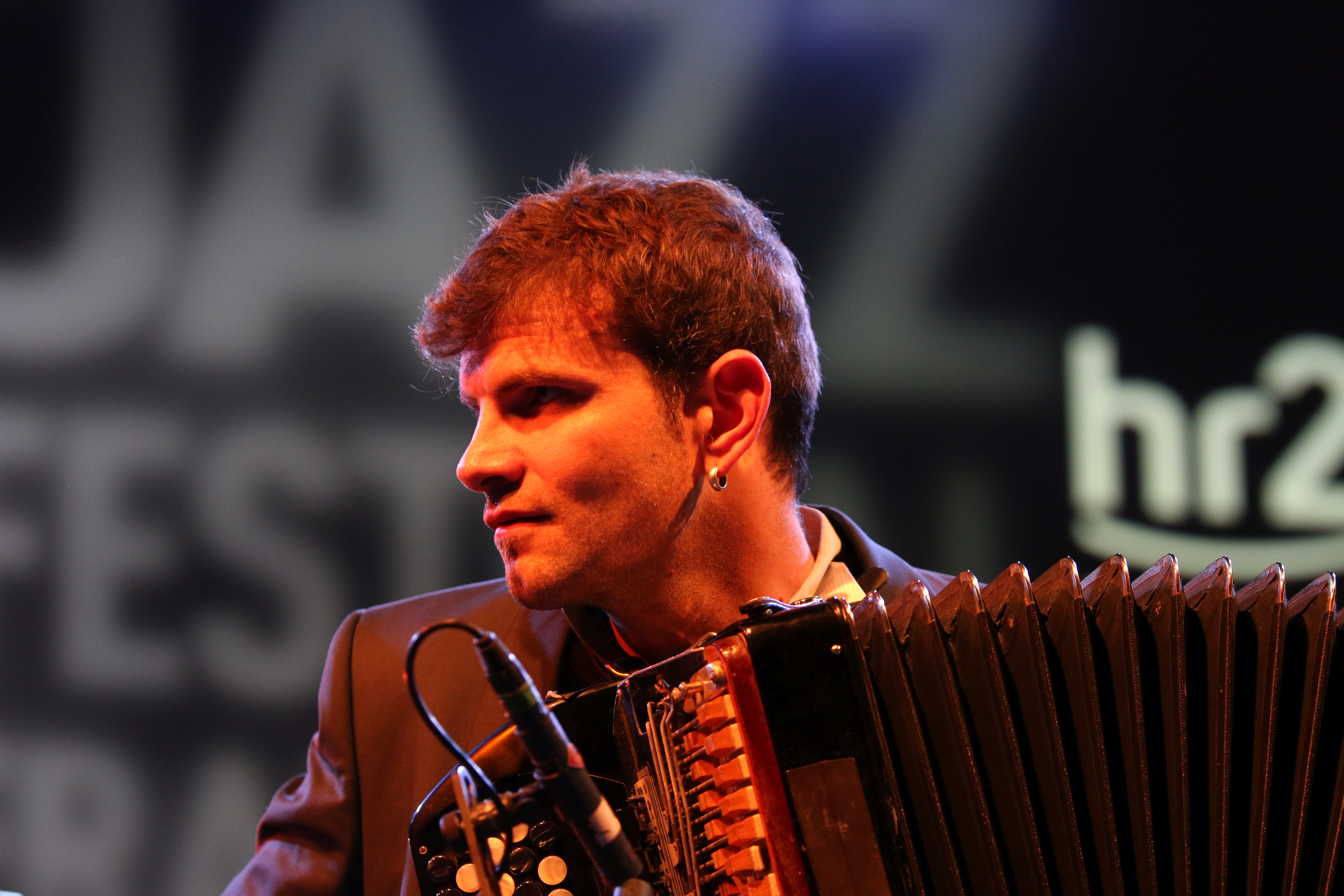 46. Deutsches Jazzfestival Frankfurt 2015: Duo Belle Epoque: Vincent Peirani